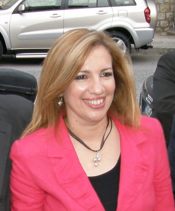 Φώφη Γεννηματά 16-05-2009